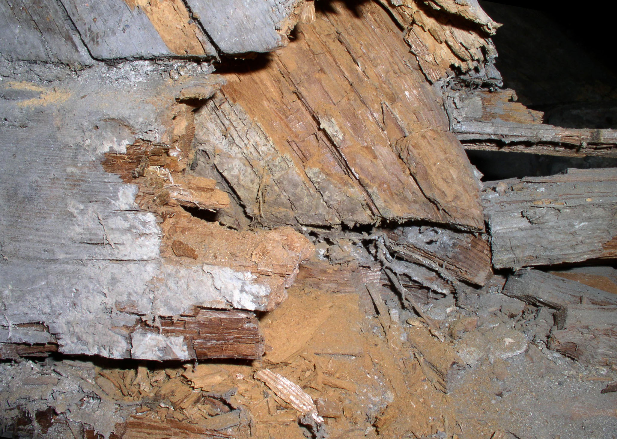 Durch Braunfäule zerstörter Fußpunkt einer Dachkonstruktion. Der Balkenkopf ist so zerstört, dass der Zapfen des Sparrenfußes frei liegt. Unterhalb des Zapfens sind Mycelstränge des Echten Hausschwamms (Serpula lacrymans) erkennbar.